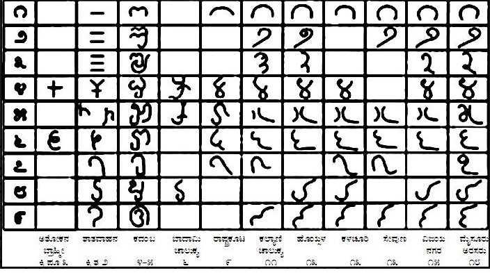 ಕನ್ನಡ: ಕನ್ನಡ ಅಂಕಿಗಳು ಬೆಳೆದುಬಂದ ದಾರಿ